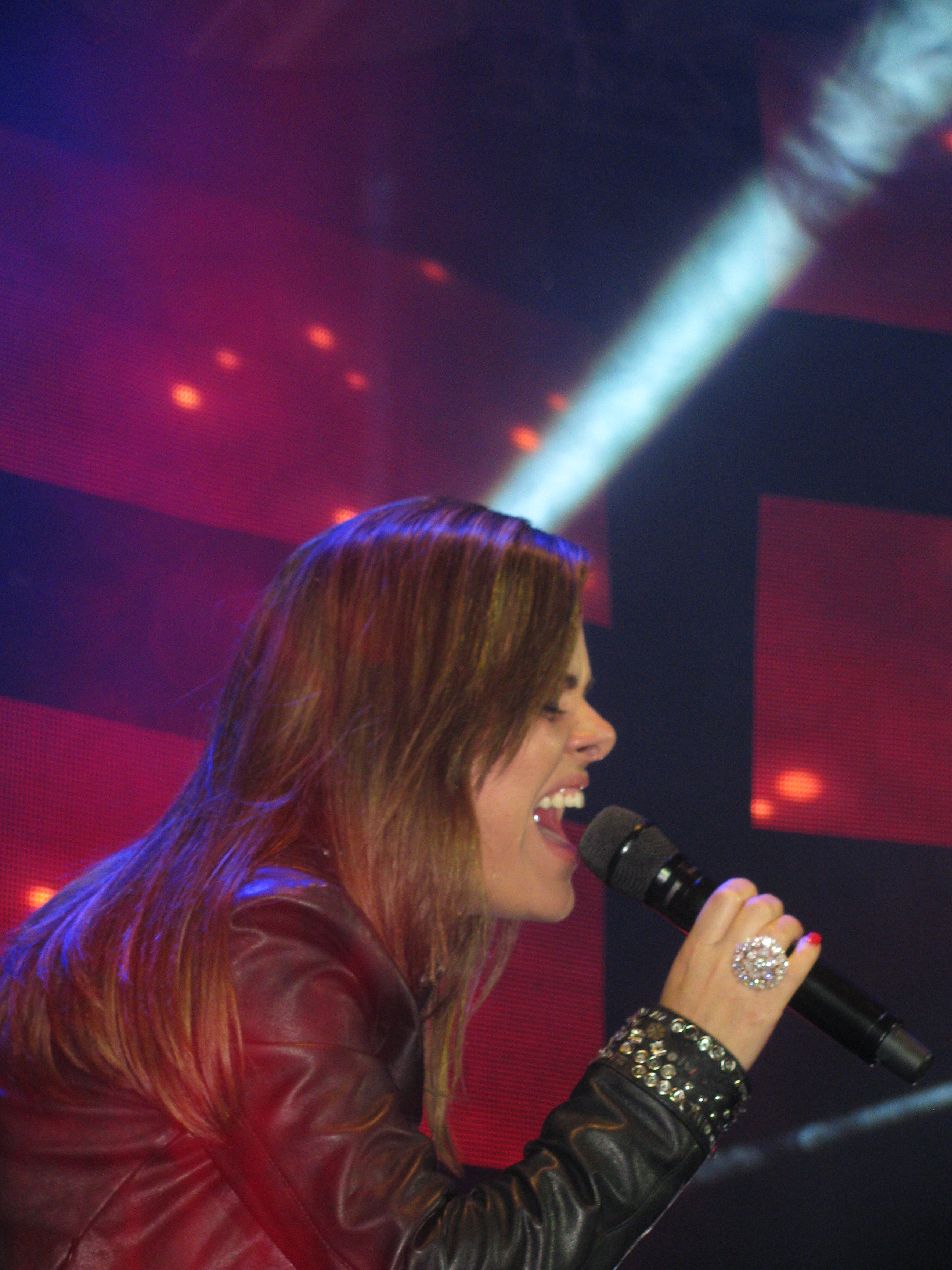 Ana Paula na Conferência Livres